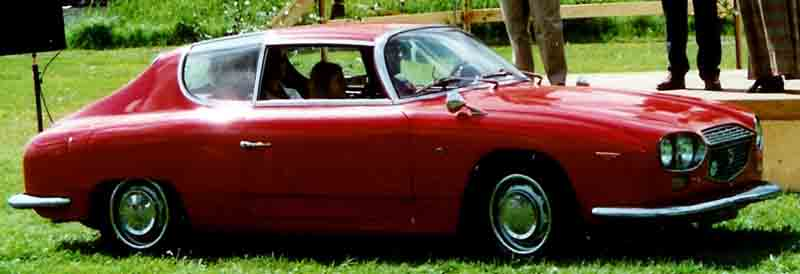 Lancia Flavia Zagato